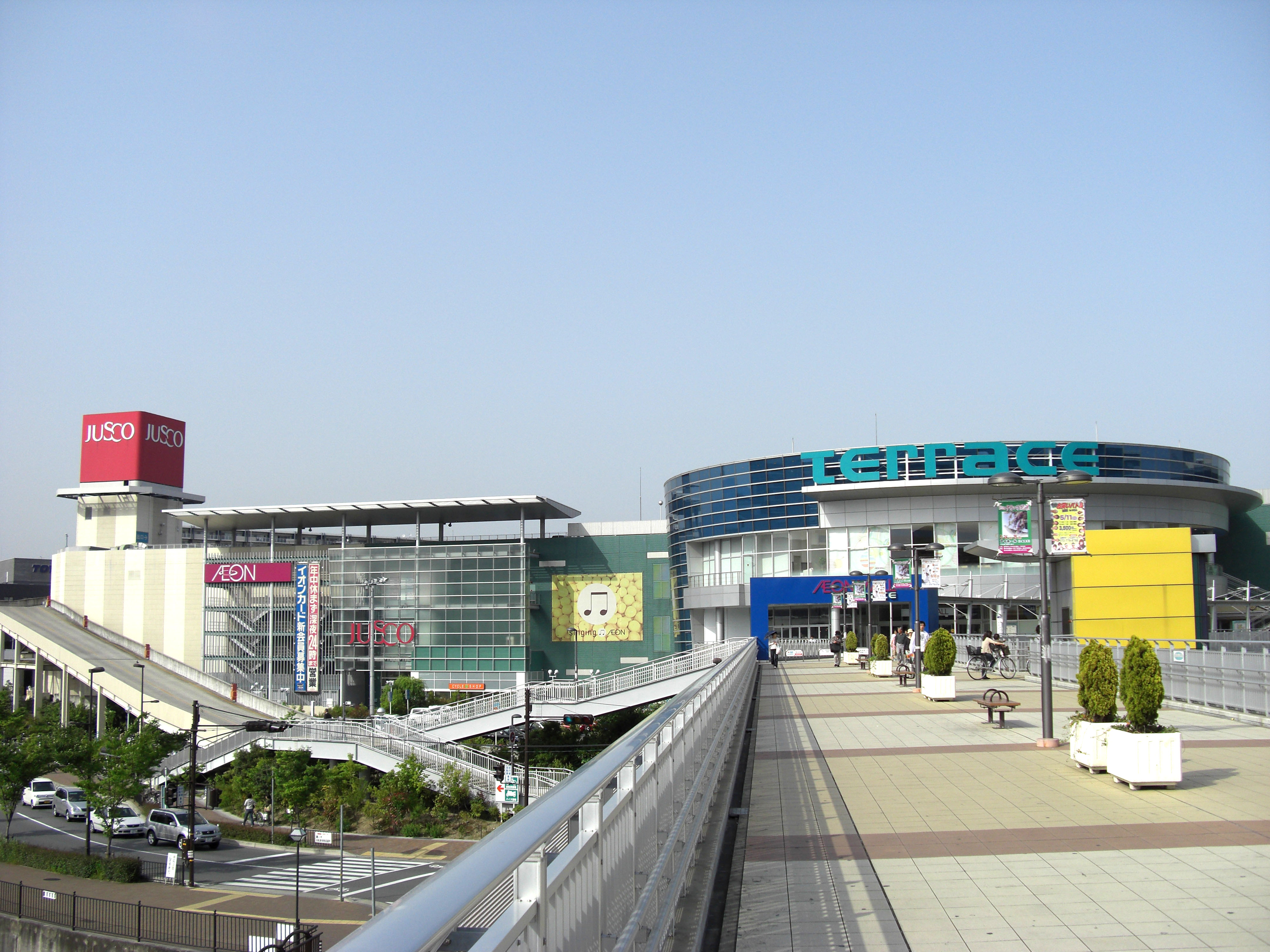 AEON MALL Itami Terrace,Fujinoki Itami-City Hyogo Japan.